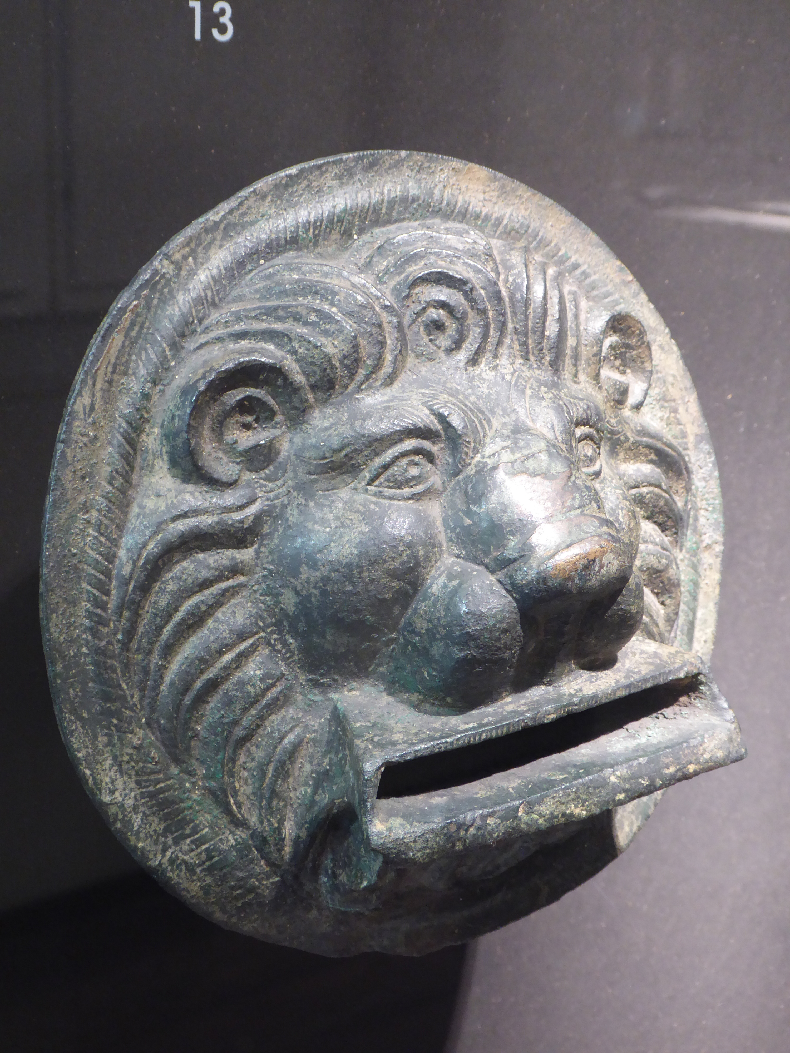 Détail de la bouche de fontaine en forme de tête de lion. Une des 20 pièces constituant le décor d’un autel et d’une fontaine dédiés à Mithra , datant de la fin du IIème / début du IIIème après J-C et découvert à Angleur en 1882 . Inscrit comme bien classés de la communauté française depuis le 8 février 2011 .